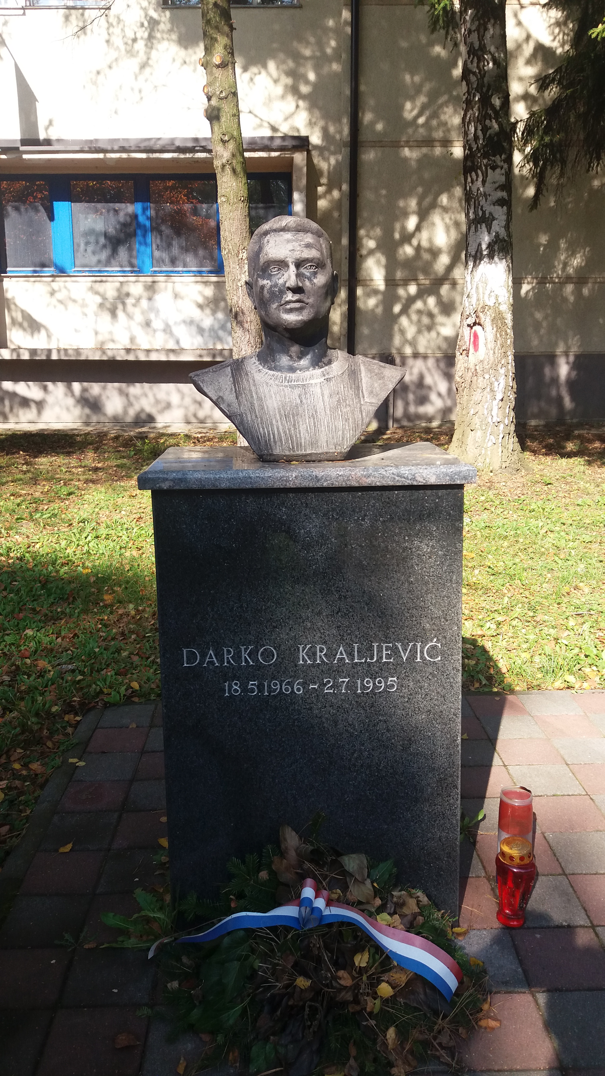 Bista Darka Kraljevića u Vitezu